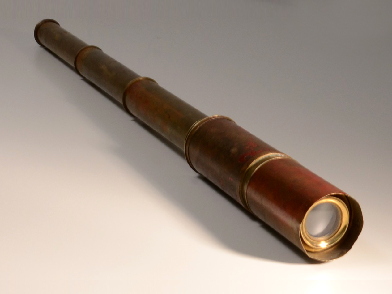 Der 1897 geborene, gebürtige Essener Karl Friedrich Neumann diente im Ersten Weltkrieg auf der SMS Westfalen und fischte das Fernrohr nach der Schlacht am Skagerrak, der größten Seeschlacht des Ersten Weltkriegs, aus der Nordsee. Neumann diente als einfacher Matrose. Er spielte Klavier, Geige, Mandoline und Trompete. Als Trompetist und Violinist war er Teil der Schiffskapelle. Die Seeschlacht hatte der damals 18-Jährige auf dem nur leicht beschädigten Schiff überlebt. Das „Day-or-Night“-Teleskop-Fernrohr der Firma „Dollond London“ aus dem 19. Jahrhundert vermachte er später seinem Sohn und dieser wiederum gab es an seinen Sohn Klaus Michael weiter. Ein ähnliches Fernrohr findet sich heute auch im Bestand des Royal Maritime Museum in Greenwich. Von der Schlacht am Skagerrak machte Karl Friedrich Neumann auch Fotos, die sich heute im Staatsarchiv in Aurich befinden. Eine Urkunde für die Teilnehmer der Schlacht befindet sich ebenfalls in Aurich.